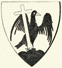 Kisfaludy-címer